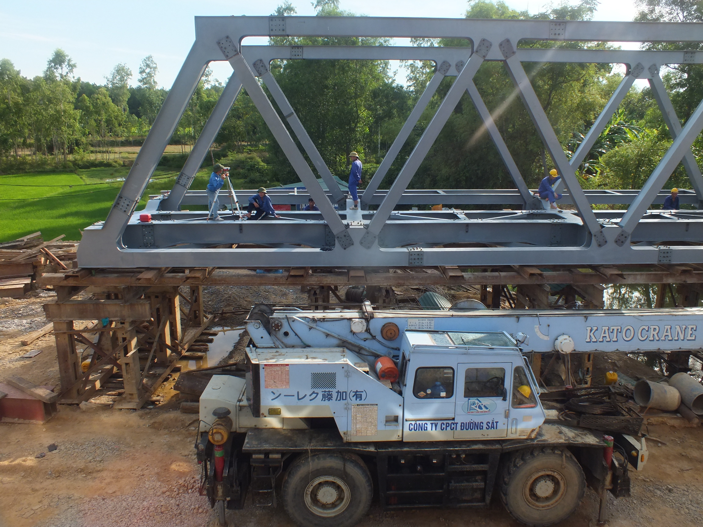 2013-07-16 North–South Railway (Vietnam)SE20